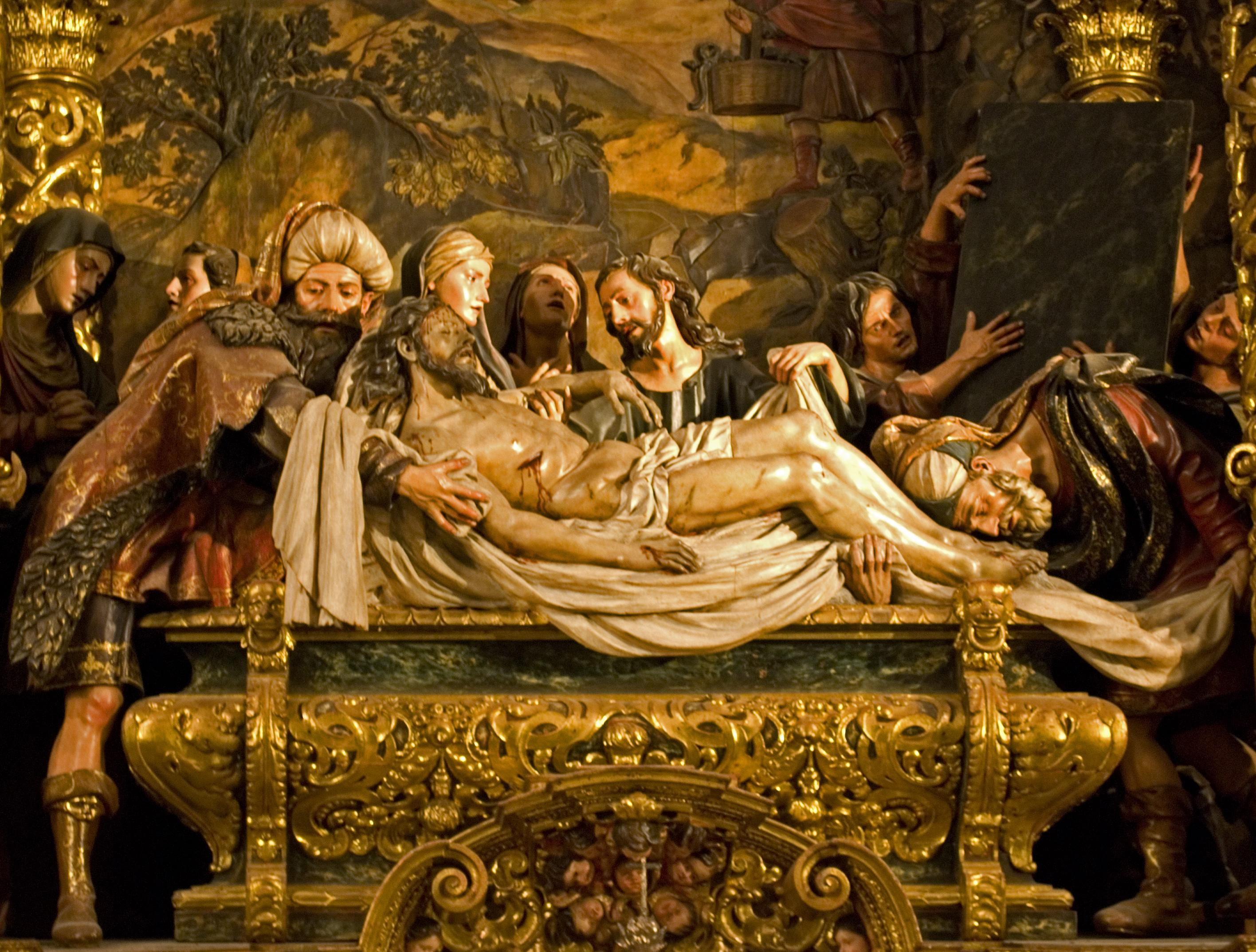 Detalle del retablo del Altar Mayor de la Iglesia de la Caridad, Hospital de la Santa Caridad de Sevilla. Representa el entierro de Cristo, obra del escultor Pedro Roldán